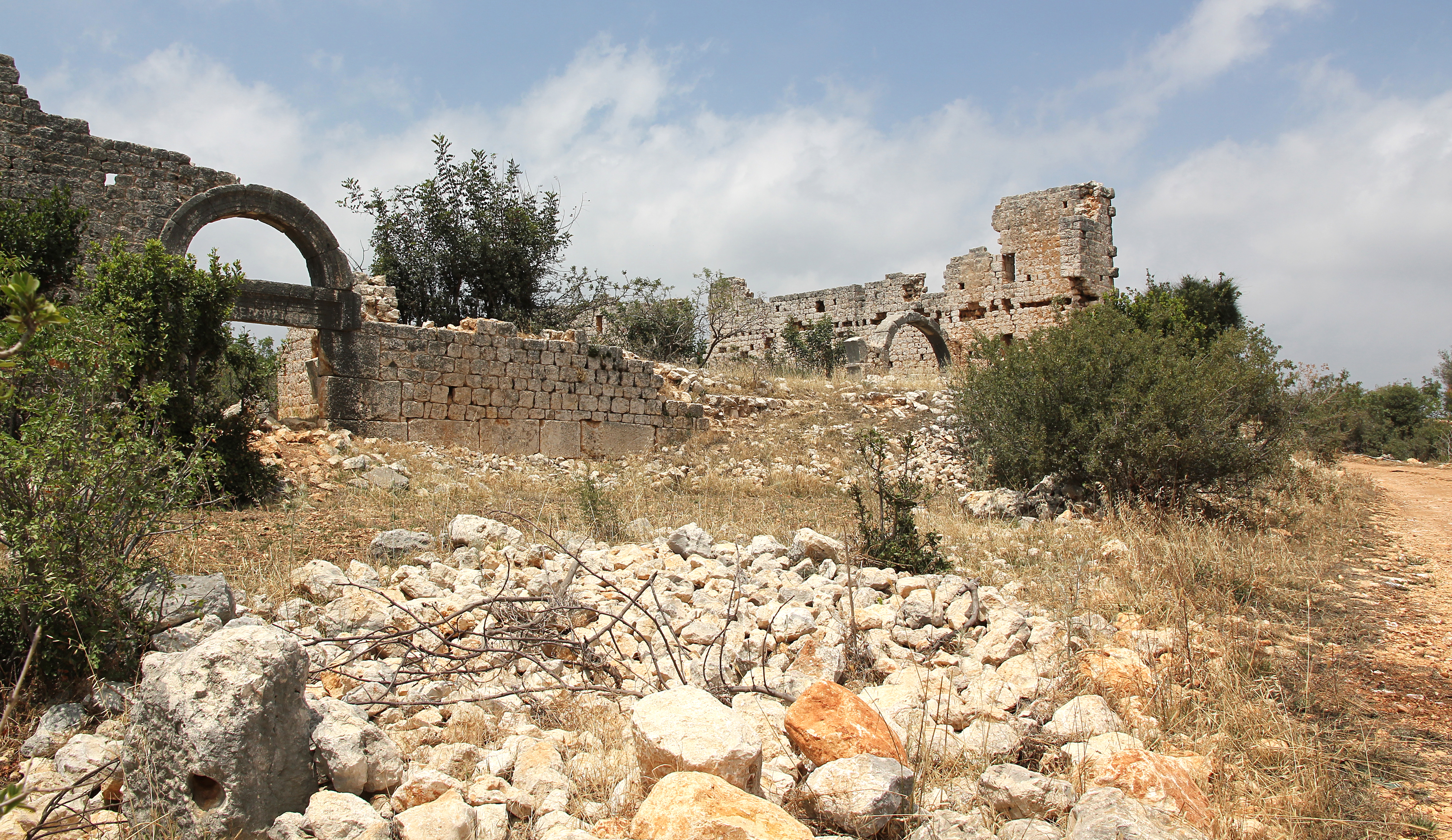 Keşli, archäologische Fundstätte in der Südtürkei bei Silifke, Gebäude von Osten